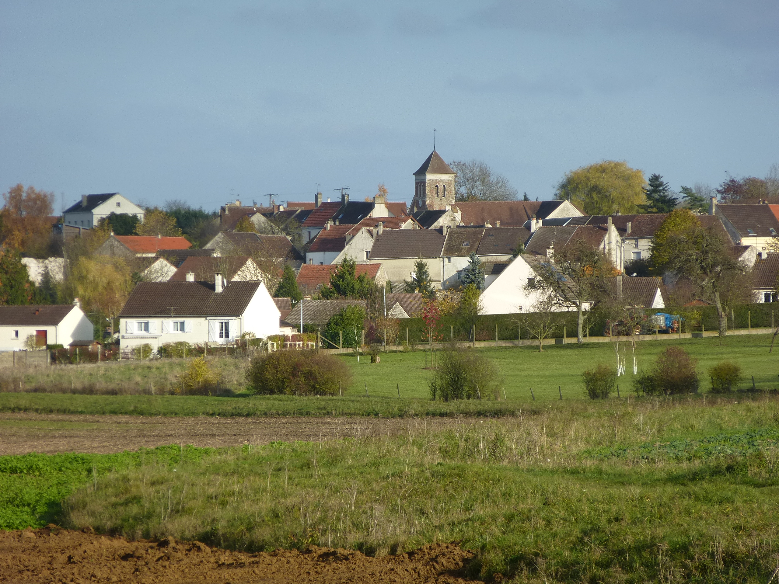 Village de Saint-Fiacre. (Seine-et-Marne, région Île-de-France).